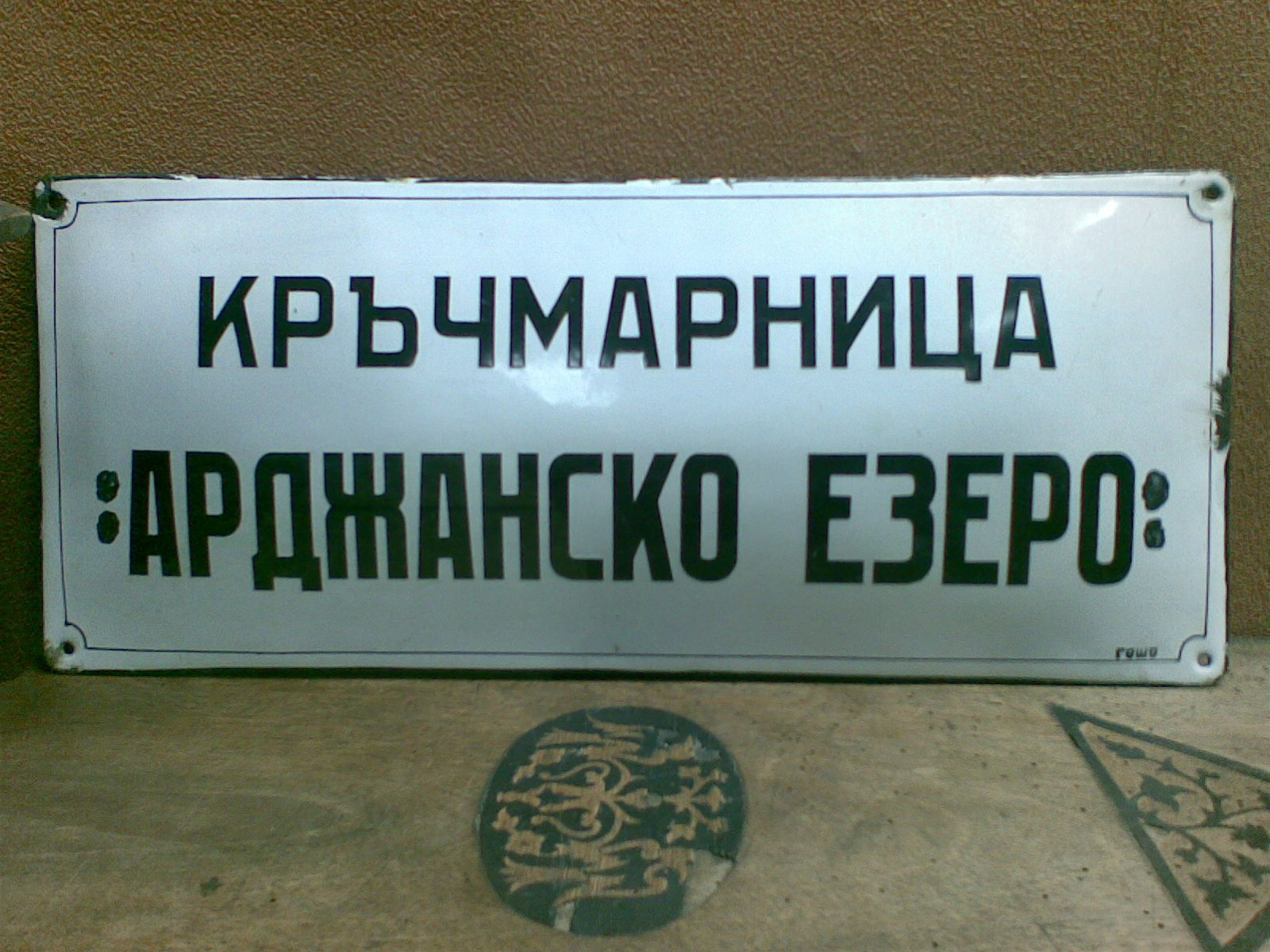 Табела на кръчма, кръстена на Арджанското езеро.